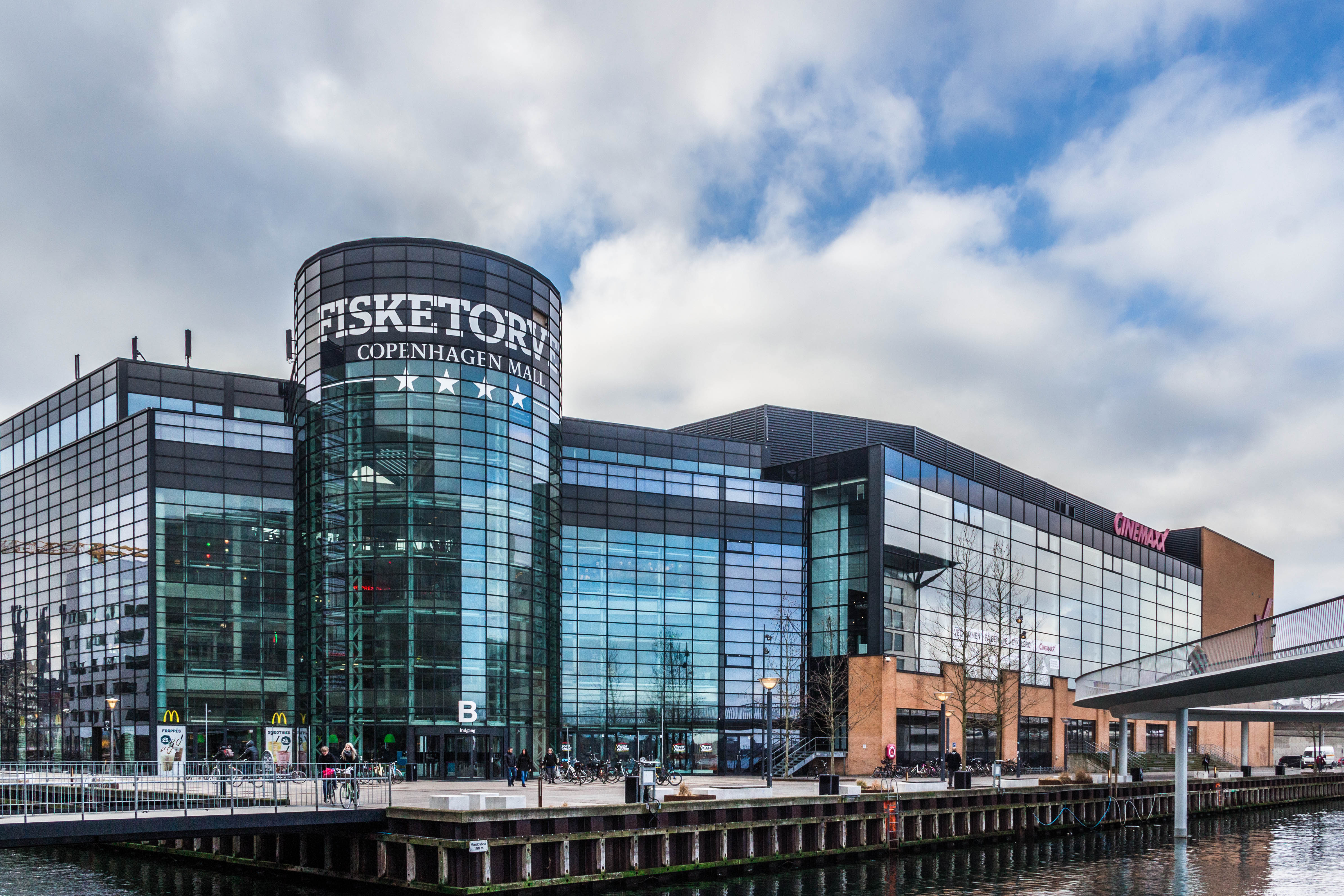 Fisketorvet shopping center at Kalvebod Brygge in Copenhagen, Denmark